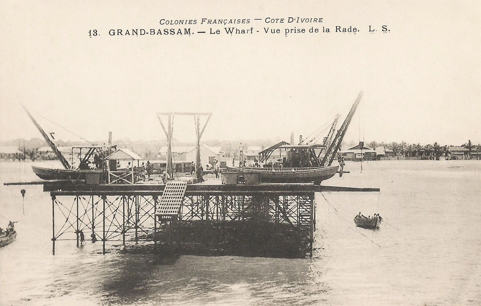 Grand-Bassam. Le Wharf. Vue prise de la rade. L. S. Colonies françaises. Côte d'Ivoire